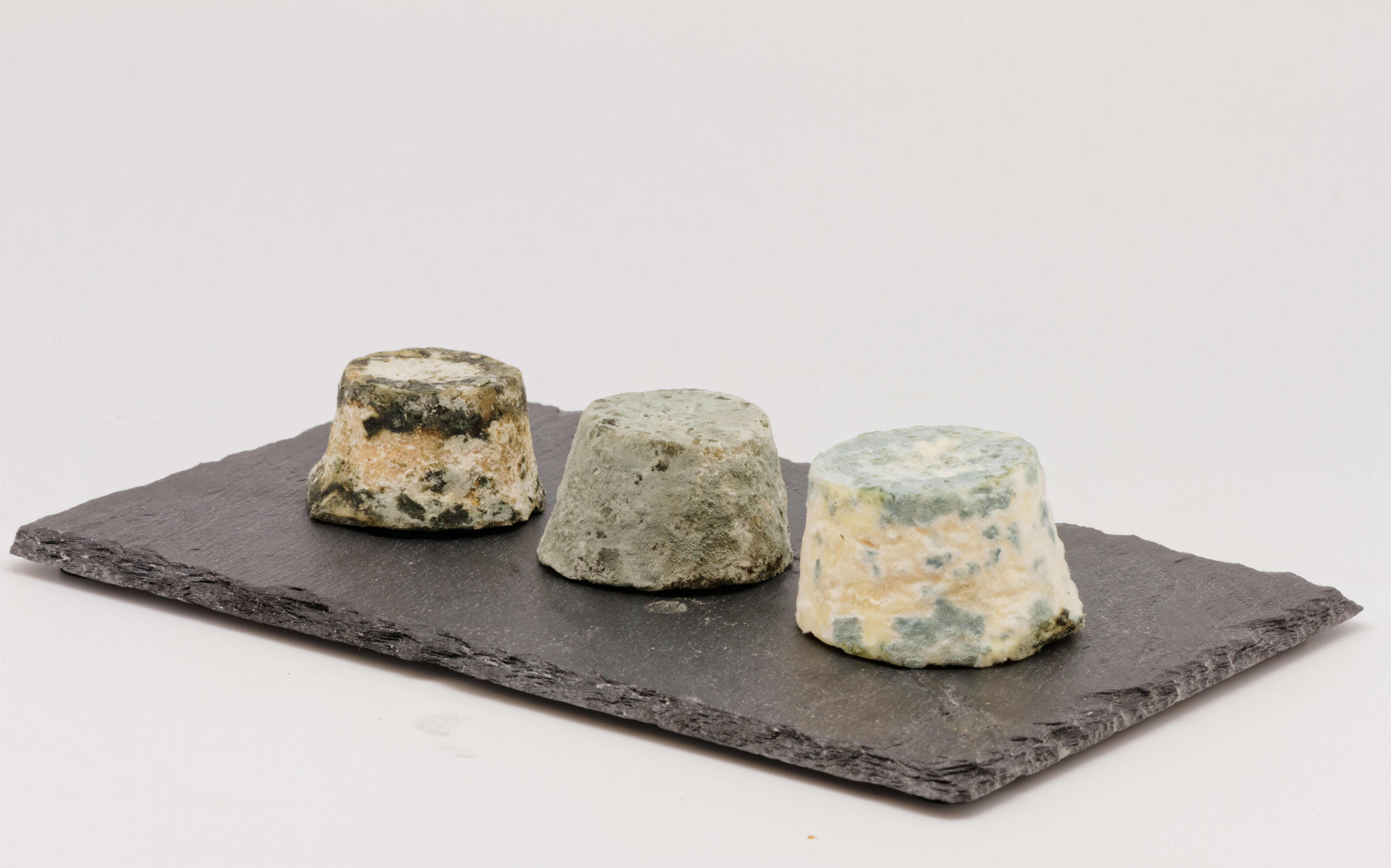 Le Mâconnais, fromage de Saône-et-Loire.